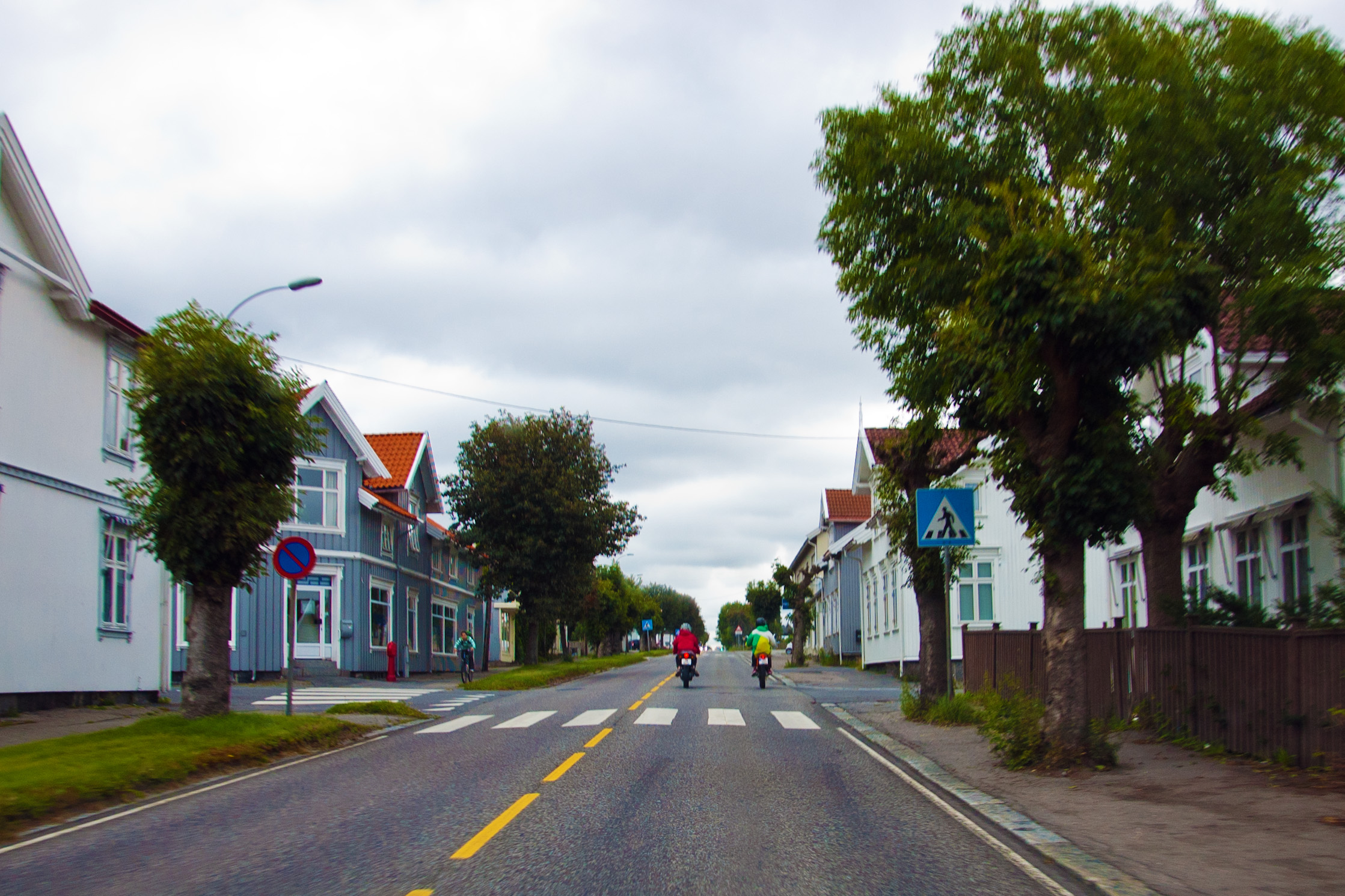 Fylkesvei 104 Nansetgata i Larvik